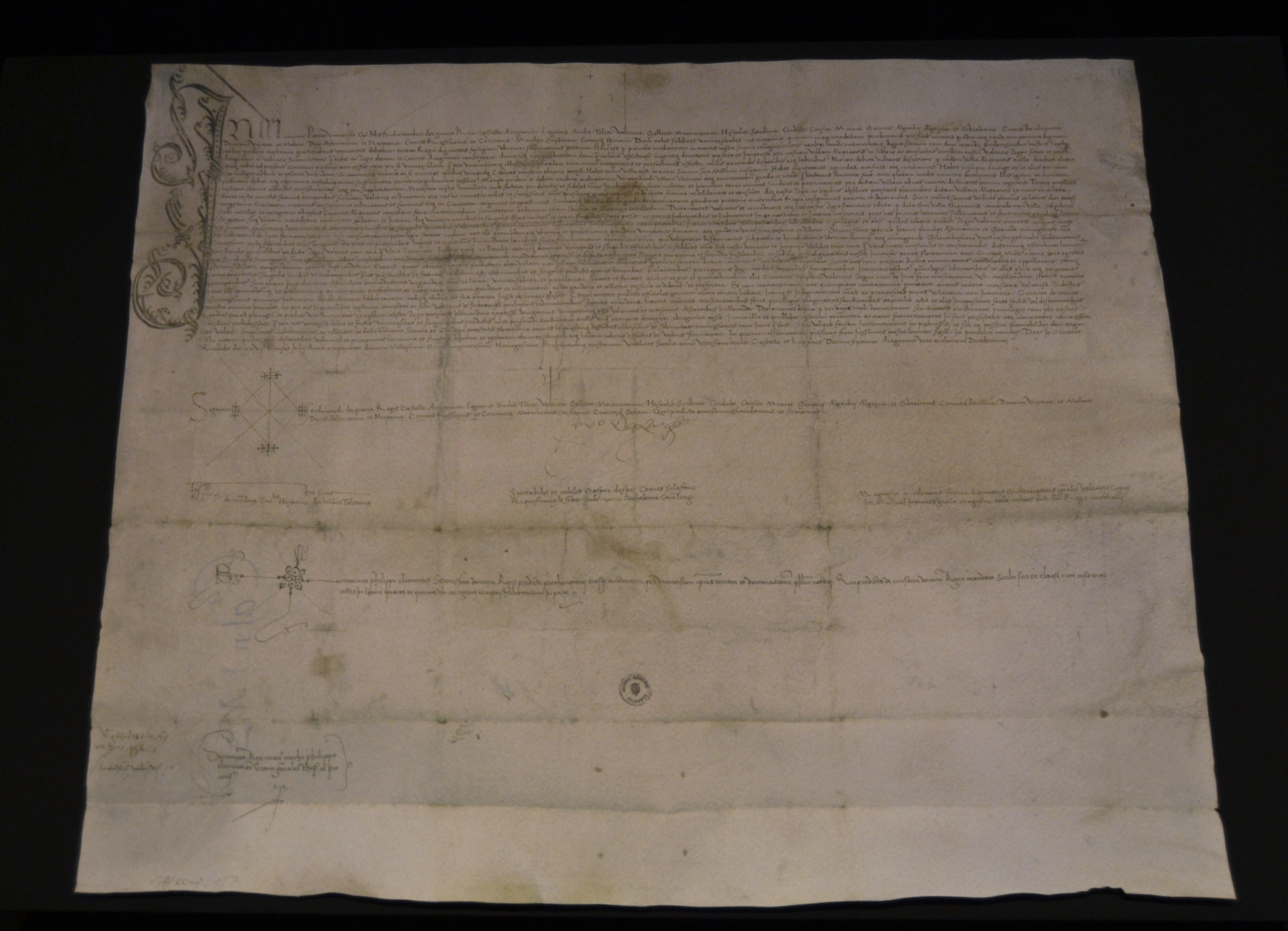 Concessió del títol de ciutat a la vila d'Alacant, 1490. L'original està a l'Arxiu Municipal d'Alacant. Museu Arqueològic d'Alacant.